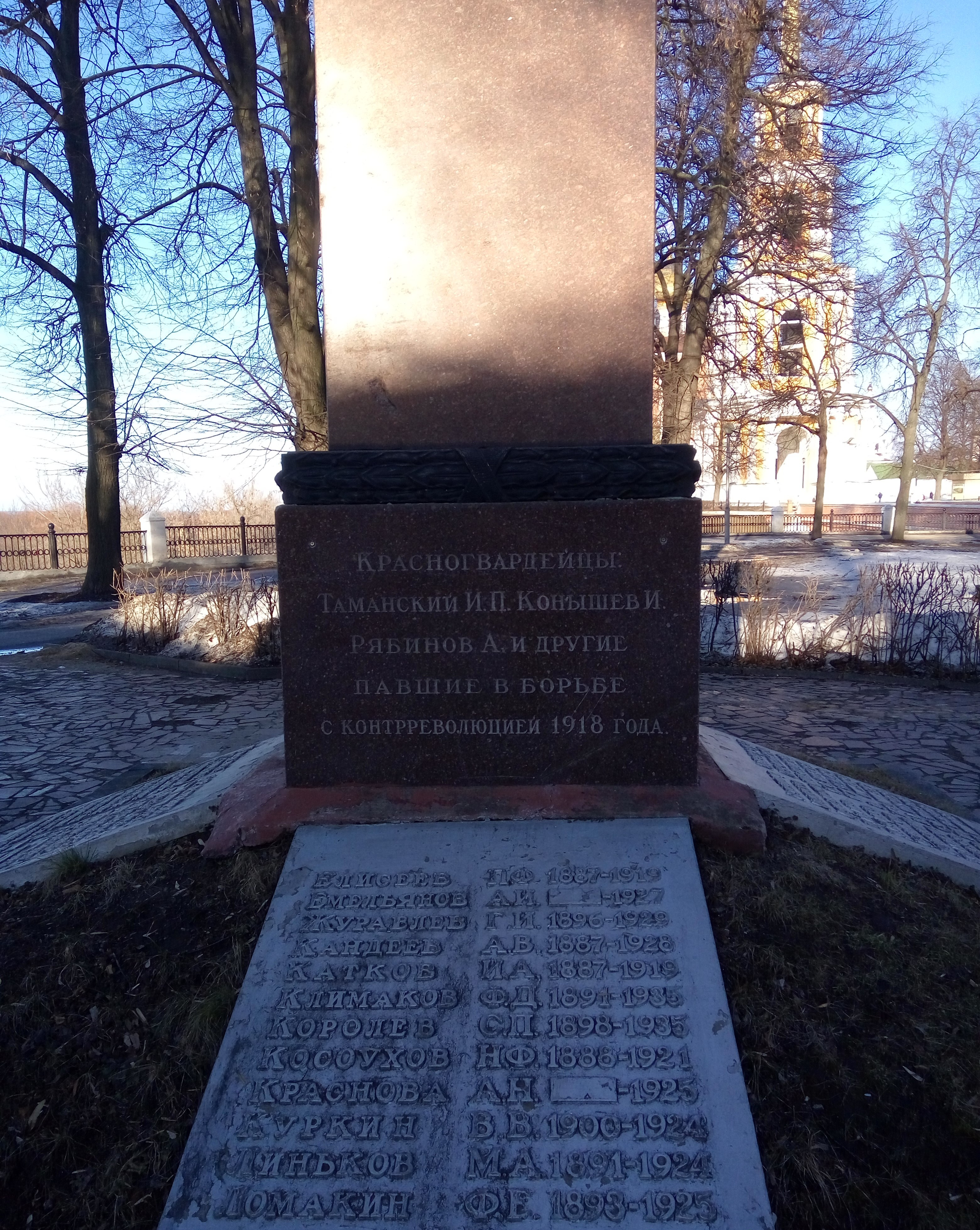 Стела героям гражданской войны 1917-1918 годов (Рязань), вид спереди